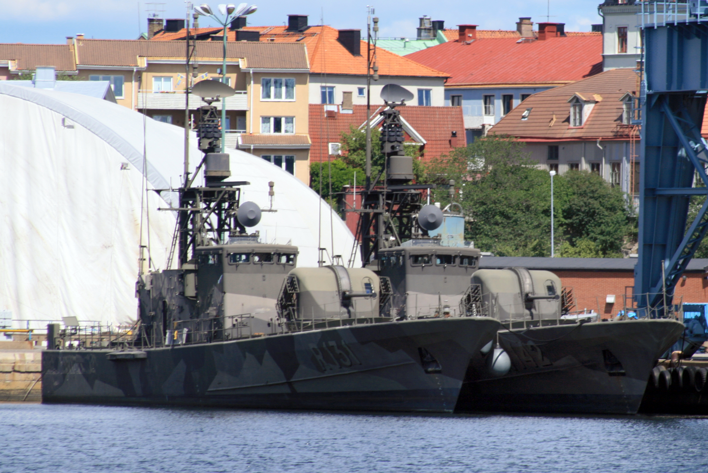 R131 Norrköping tillsammans med R142 Ystad i Karlskrona 2006-07-14